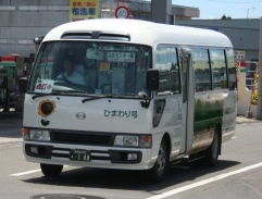 高尾野町から引き継いだバス